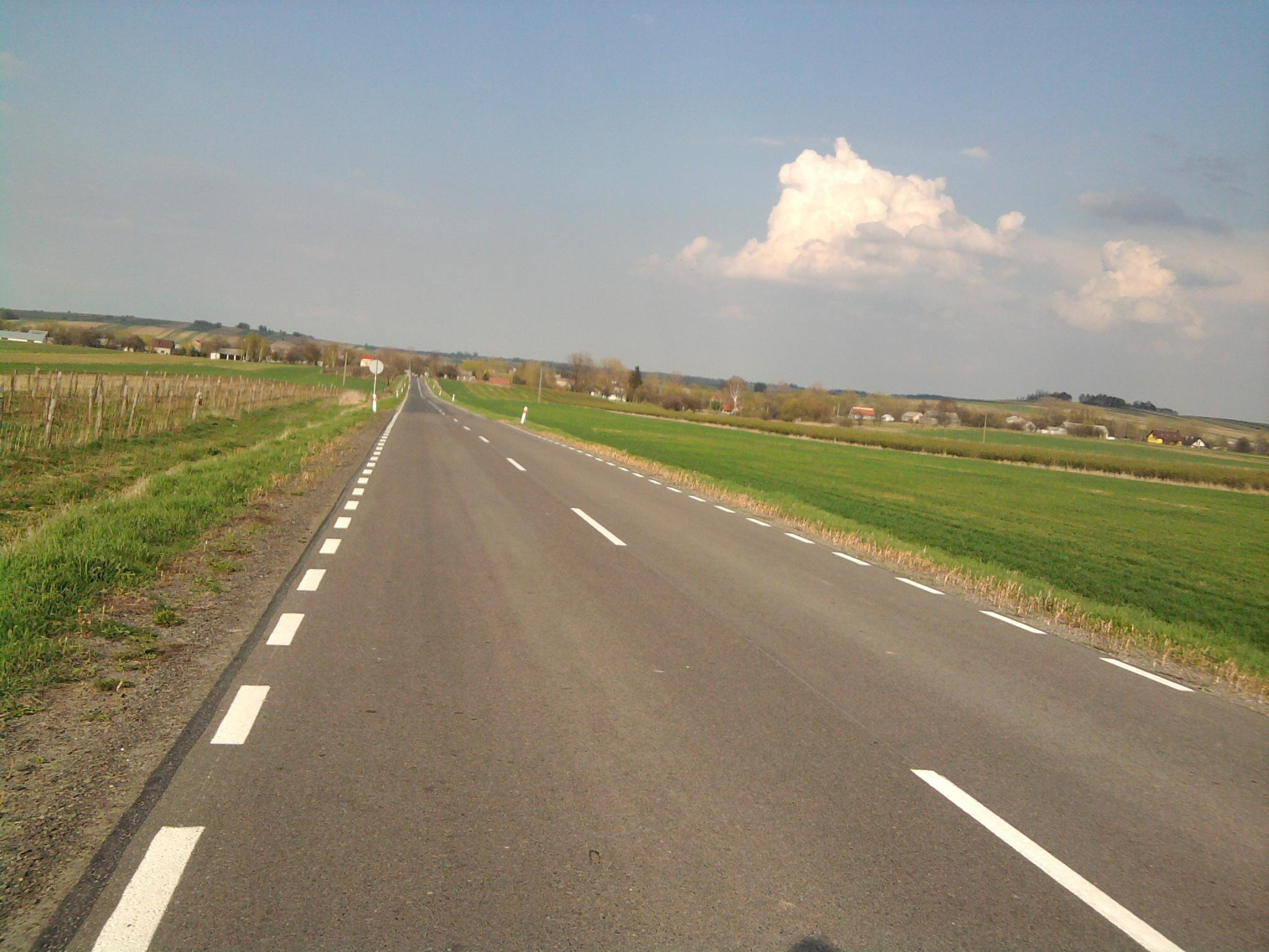 Droga wojewódzka nr 836 przy wyjeździe z Bychawy.